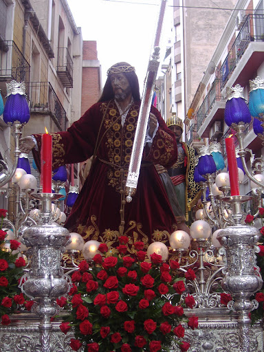 Nuestro Padre Jesús de la Caída, perteneciente a la Cofradía del Perdón de Orihuela